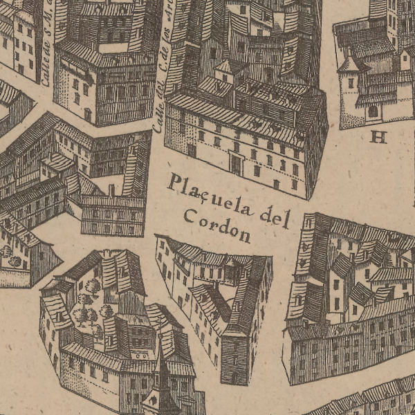 Detalle de la plazuela del Cordón, en un plano de Madrid del siglo XVII.